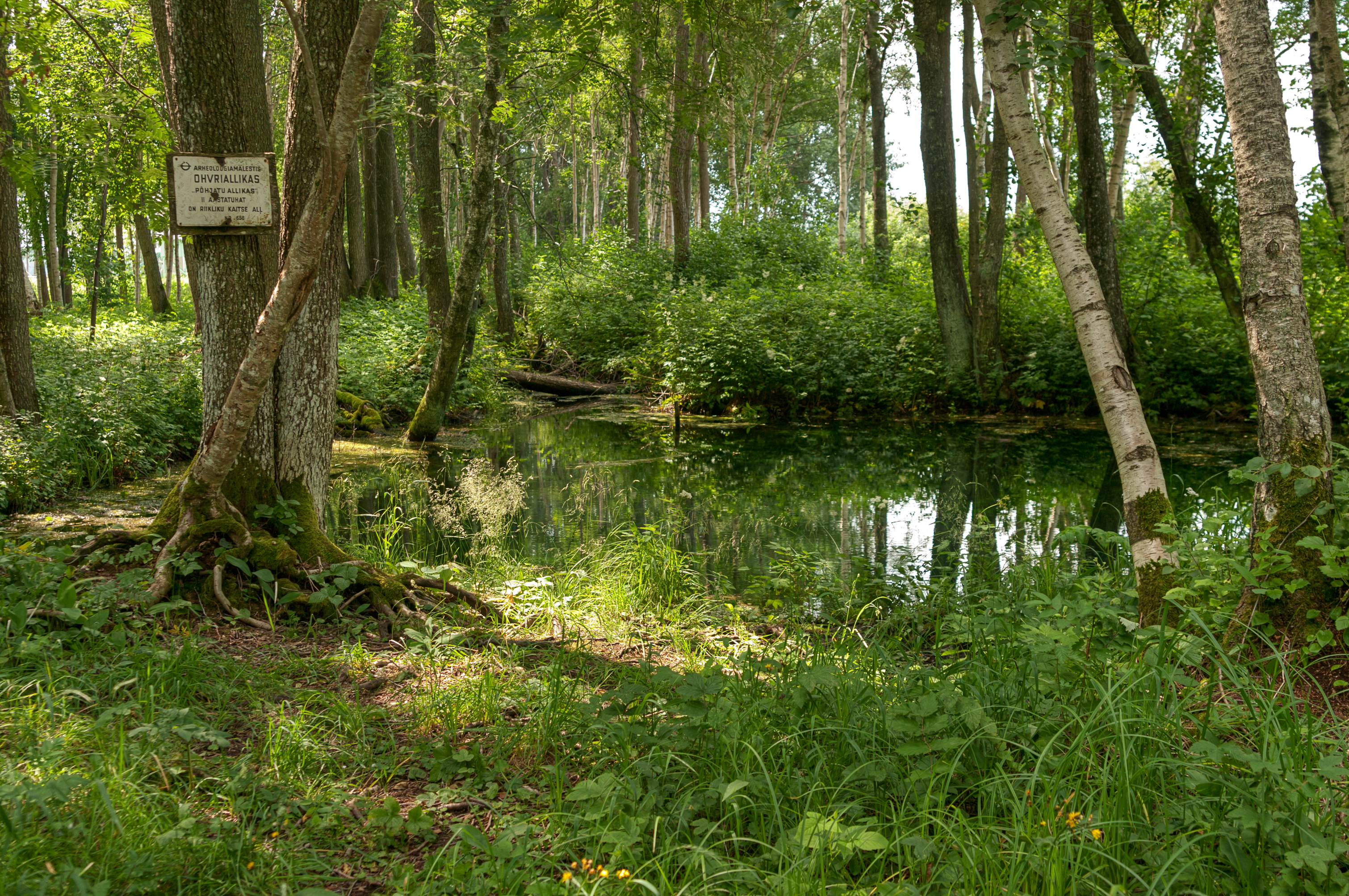 Ohvriallikas "Põhjatu allikas" Saaremaal, Kaarma vallas, Pähkla külas.